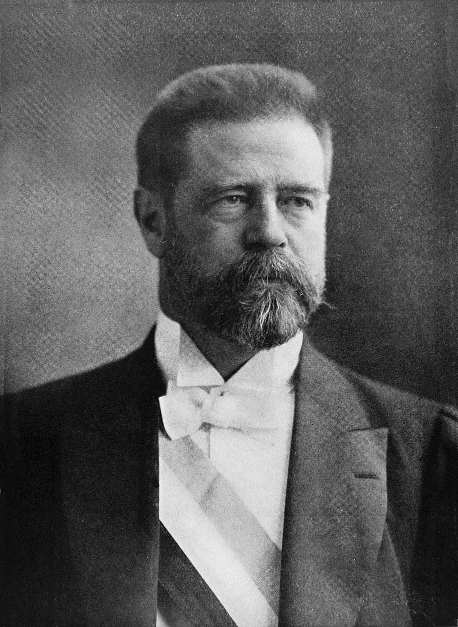 Germán Riesco Errázuriz (Rancagua, 28 de mayo de 1854 - Santiago, 8 de diciembre de 1916). Senador y Presidente de Chile.